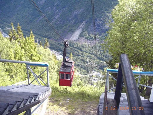 Krossobane in Rjukan von Gvepseborg auf die Talstation gesehen.